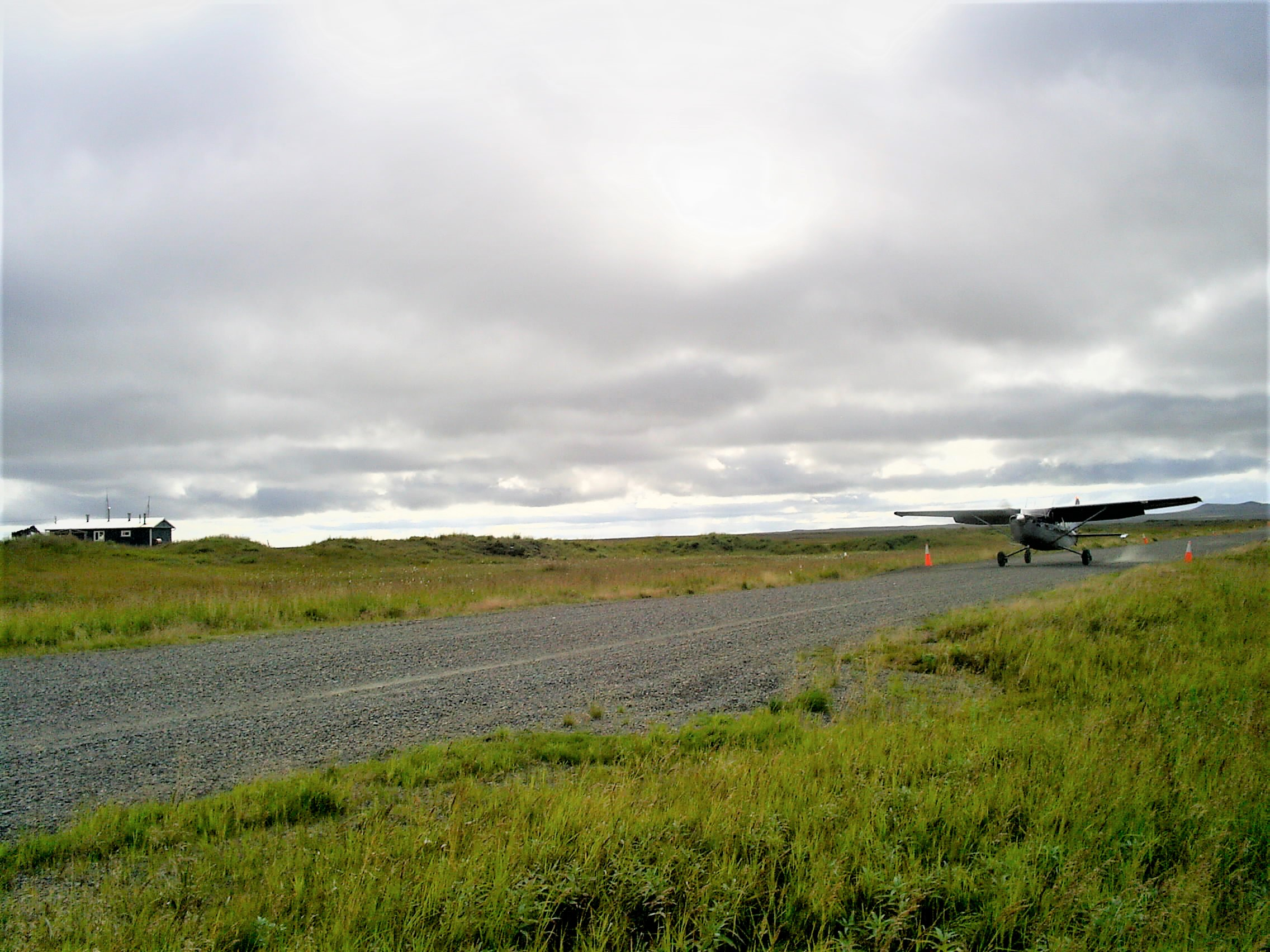 Plane landing at CYF